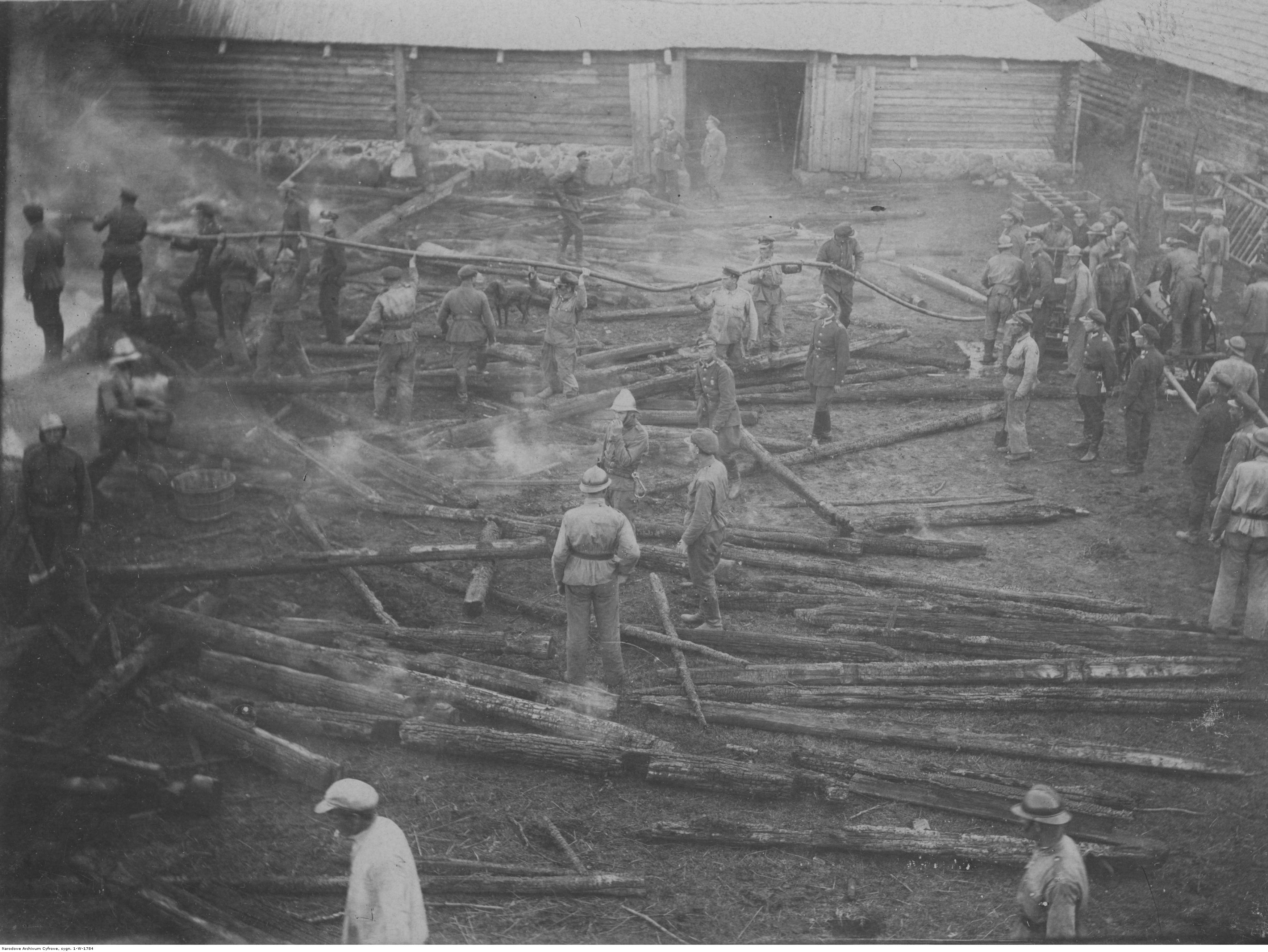 Straż pożarna 7 Batalionu Korpusu Ochrony Pogranicza podczas gaszenia pożaru w majątku Alizberg, w okolicy Podświla. Koncern Ilustrowany Kurier Codzienny - Archiwum Ilustracji. Sygnatura: 1-W-1784